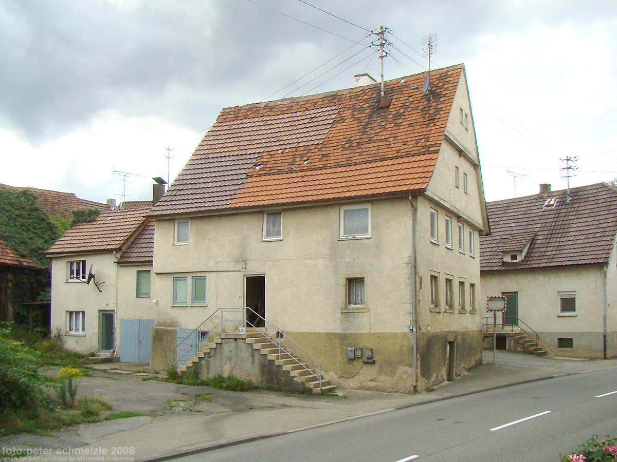 Denkmalgeschütztes Handwerkerhaus Schlossstr. 47 in Heilbronn-Kirchhausen